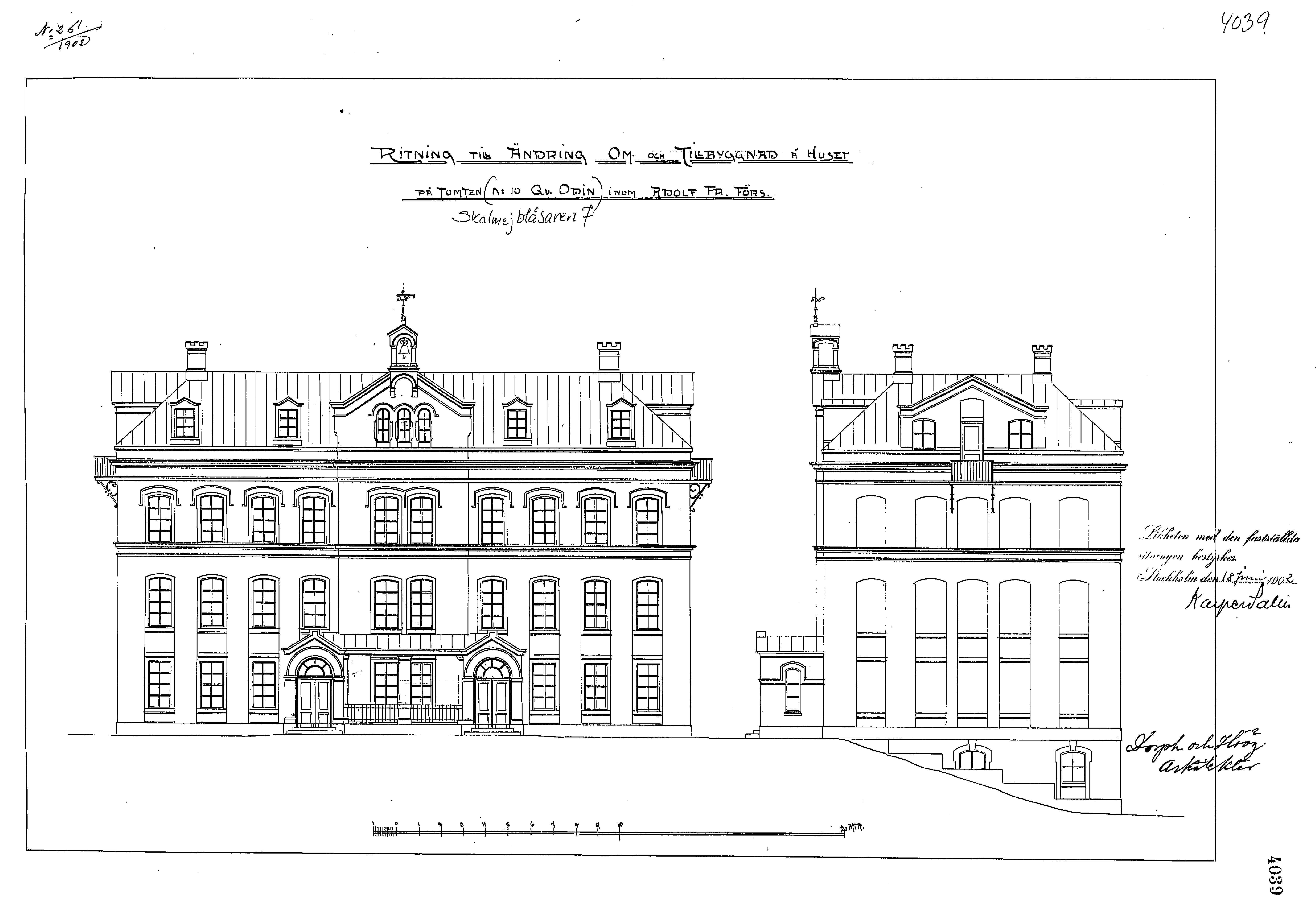 Stockholms stadsmissions barnhem, Norrtullsgatan 20 (senare Idungatan 1), ombyggnadsritningar 1902